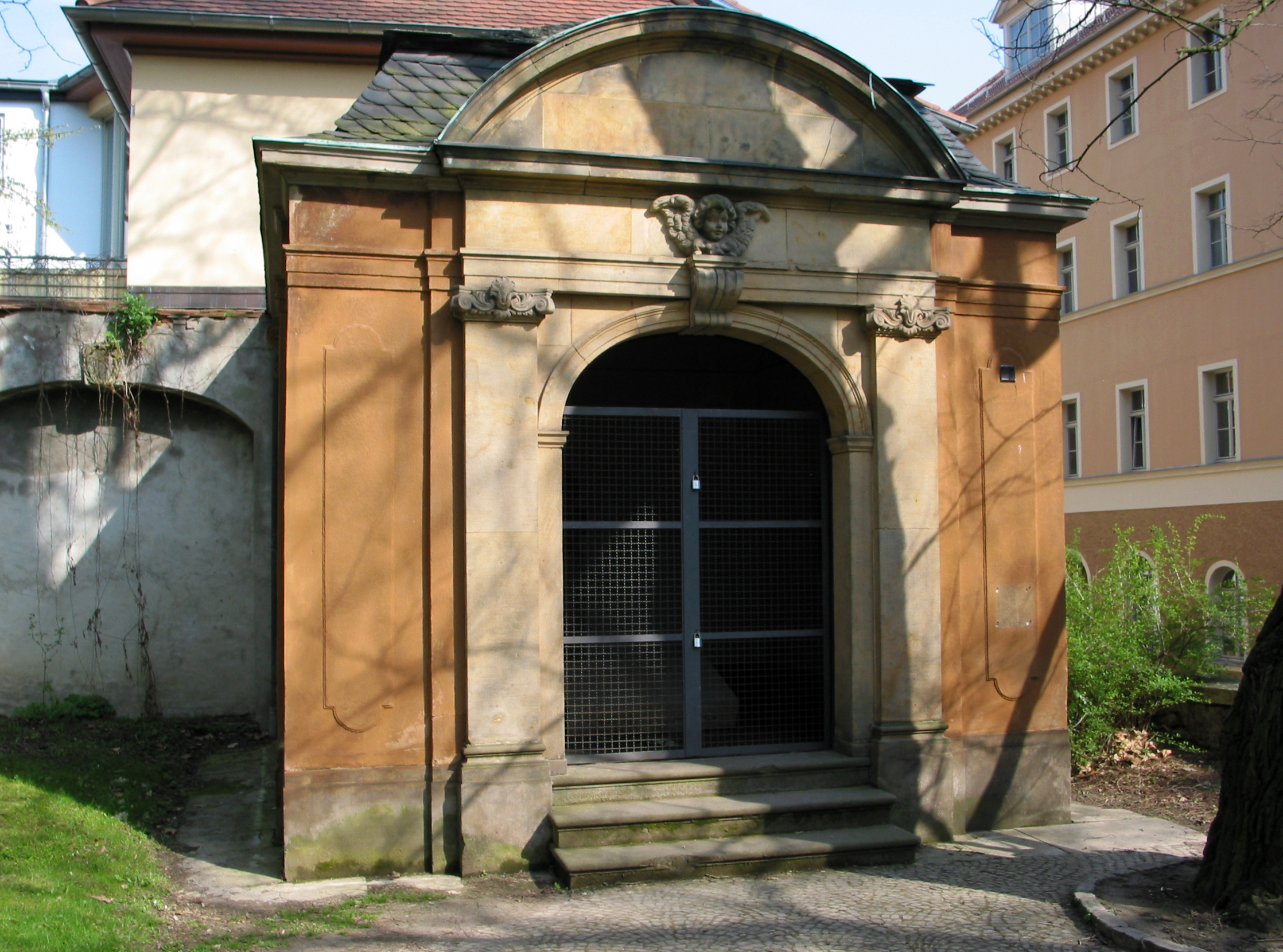 Westansicht des Kassengewölbes (Schillergruft) auf dem Jakobskirchhof in Weimar.